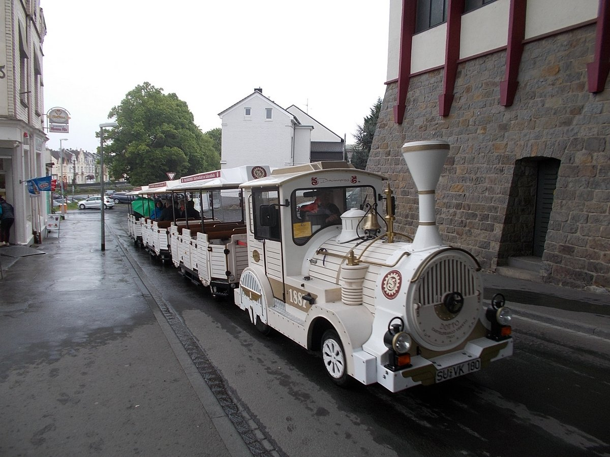 Wegebahn „Lokomobil“ in der Drachenfelsstraße an der Talstation der Drachenfelsbahn in Königswinter